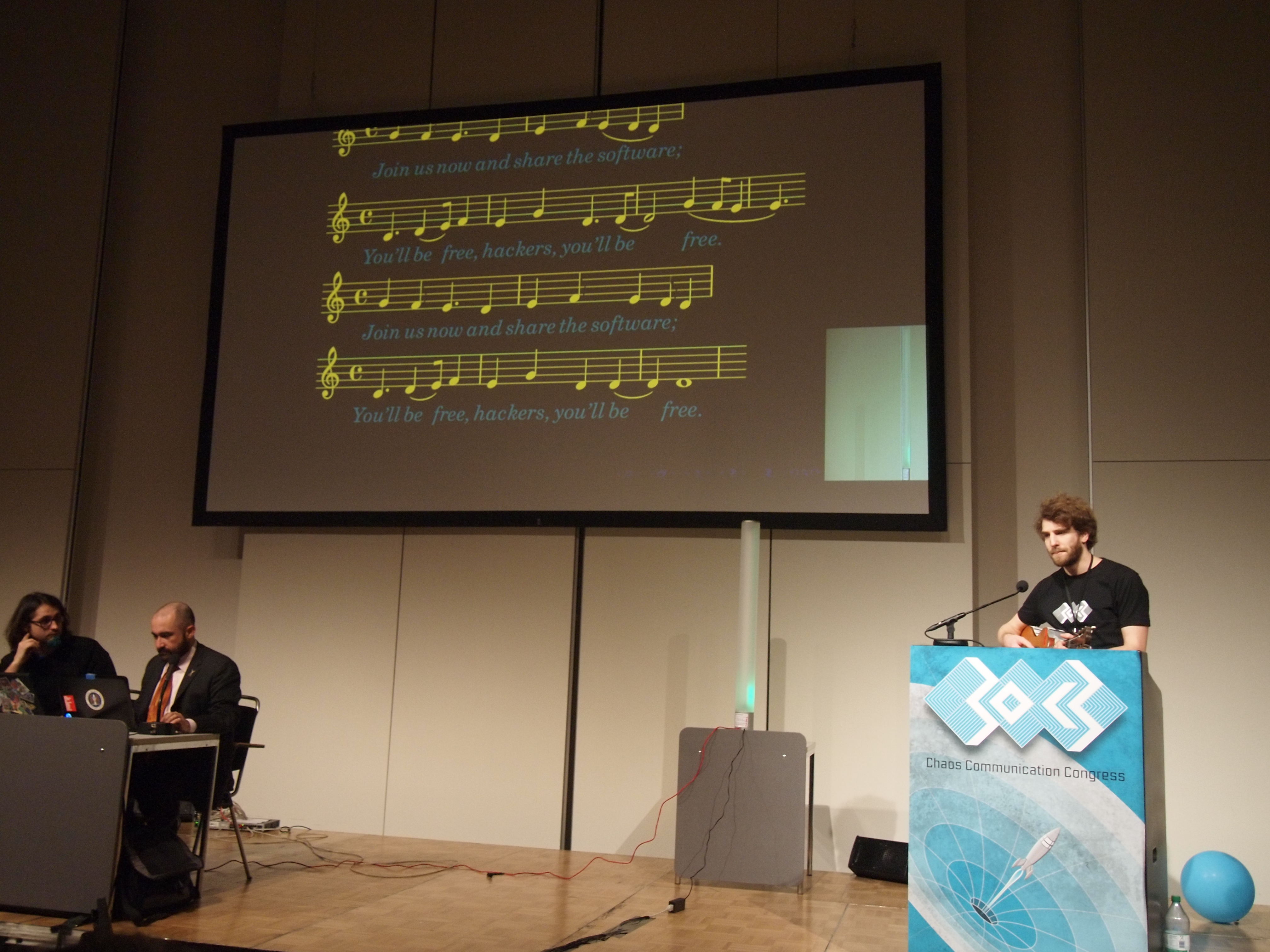 Marius-Quintus Stübs aka Mquintus beim Spielen des Free Software Song von Richard Stallmann auf den Lightning Talks des 30C3